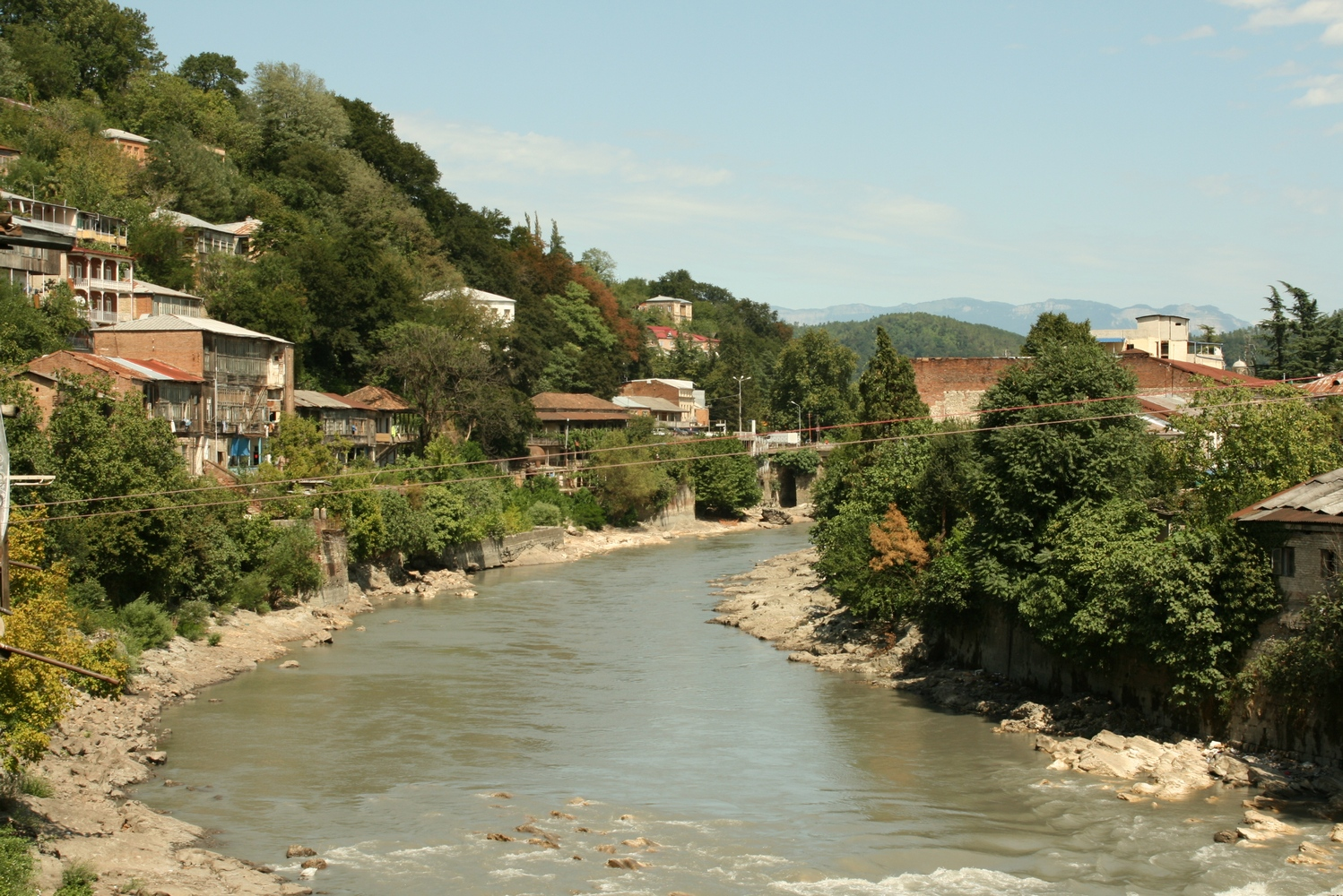 Kutaisi